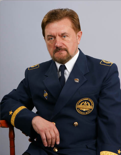 Завідувач кафедри підземної розроб¬ки родовищ Національного гірничого університету, доктор технічних наук, професор, академік Академії інженерних наук України, Заслужений діяч науки і техніки, Лауреат Державної премії України в галузі науки і техніки